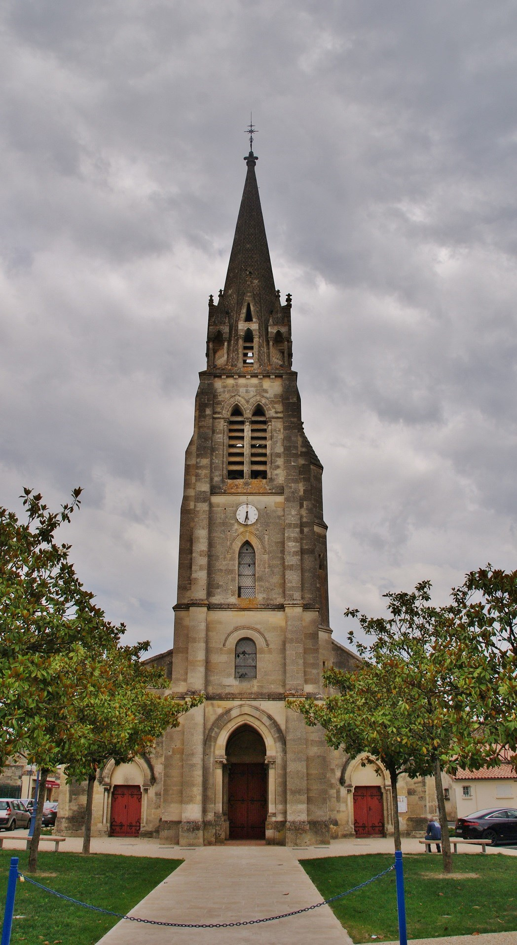 église St Medard